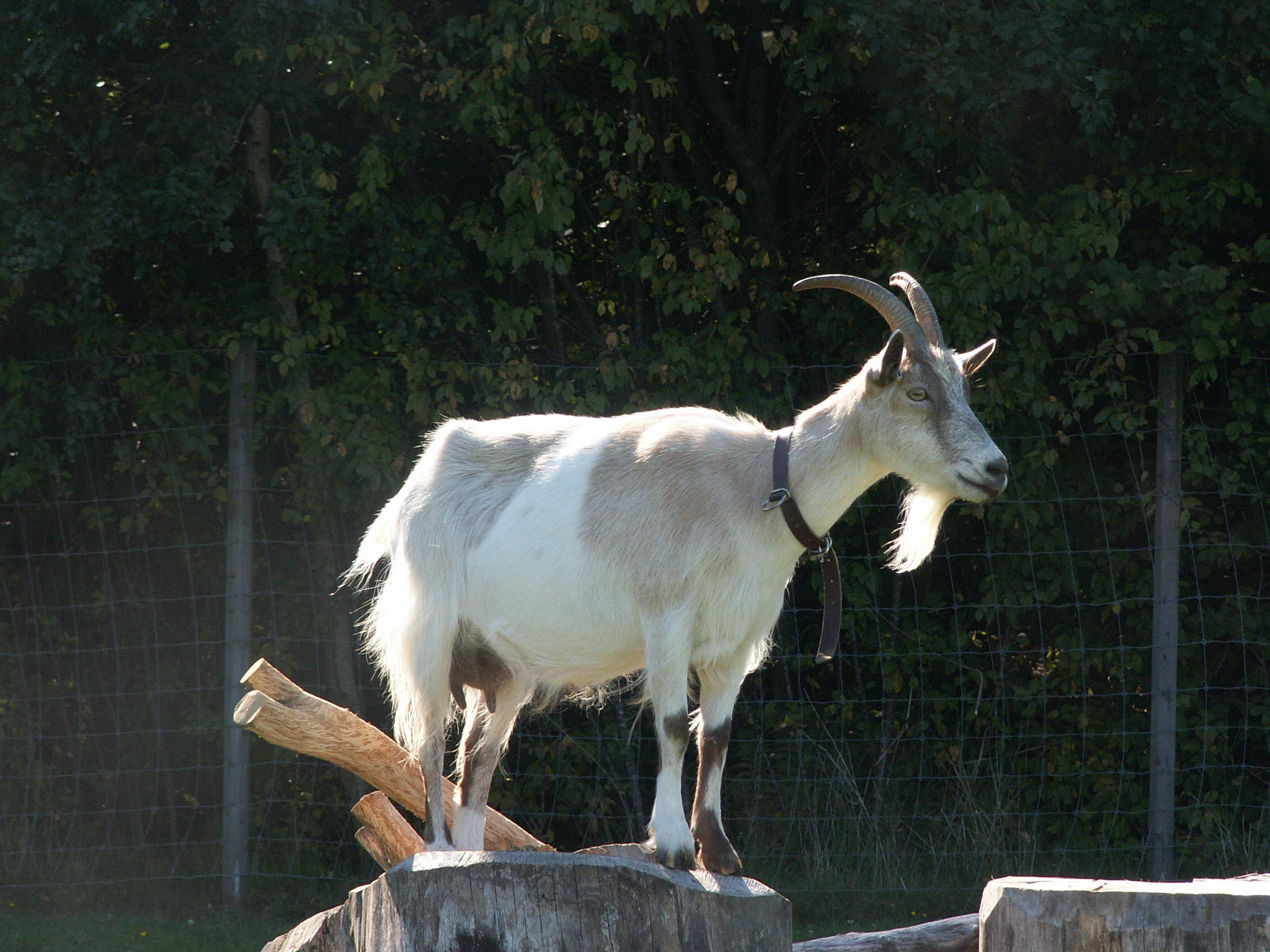 Jämtget